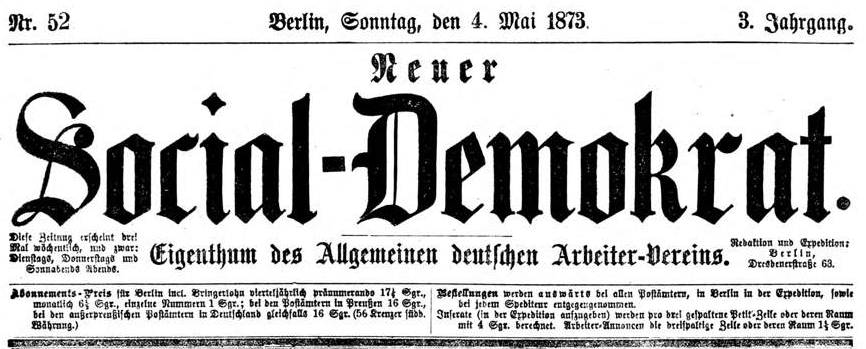 Zeitungskopf der Zeitschrift "Neuer Social-Demokrat" von 1873 Nr.52 vom 4. Mai